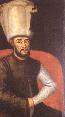 Sultan Mustafa I "the Mad", oil on canvas, Topkapı Sarayı Müzesi, Istanbul (Inv. 17/389)